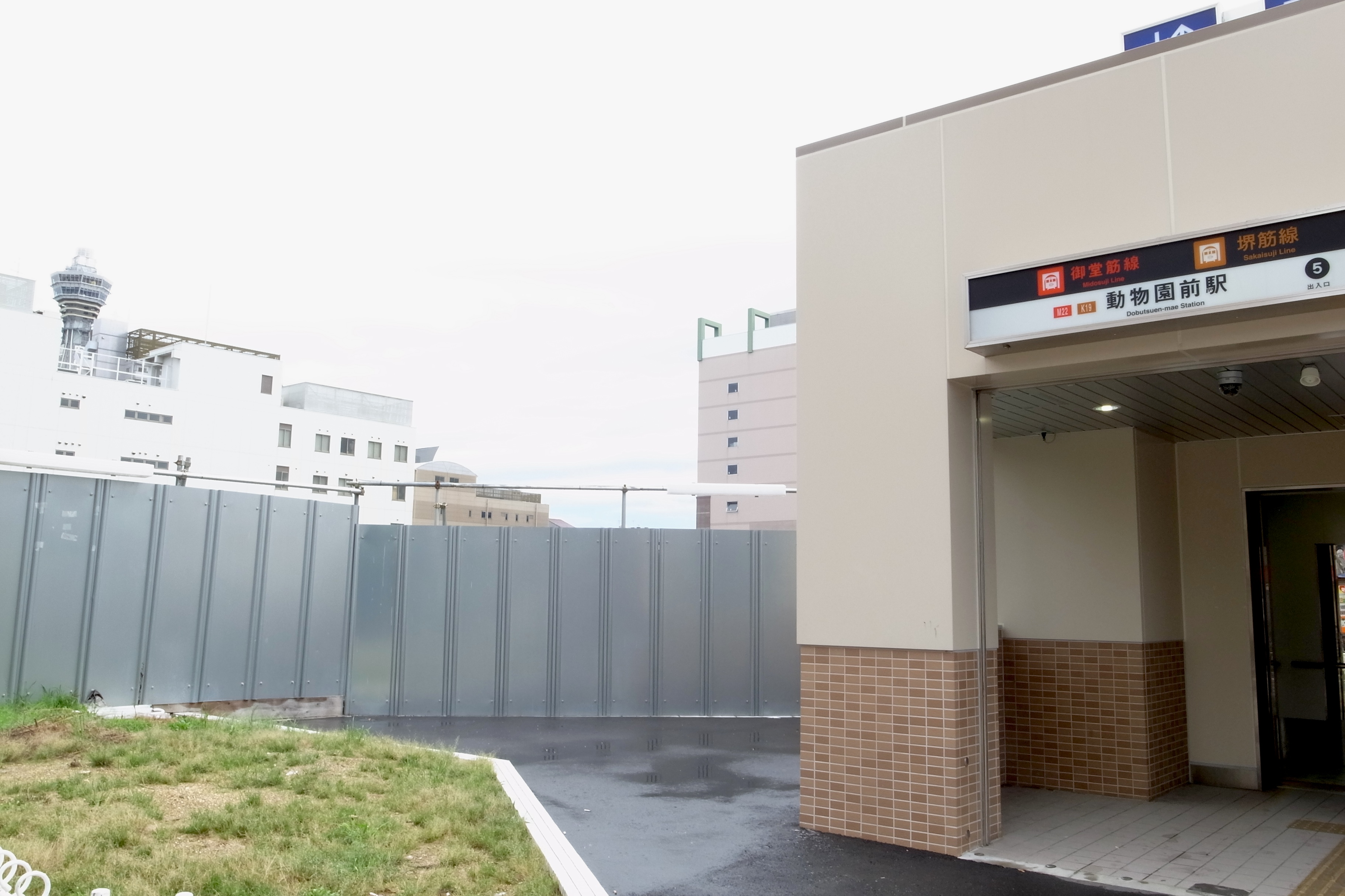 Dōbutsuen-mae Station, number 5 exit/entrance （動物園前駅の五番出入口）